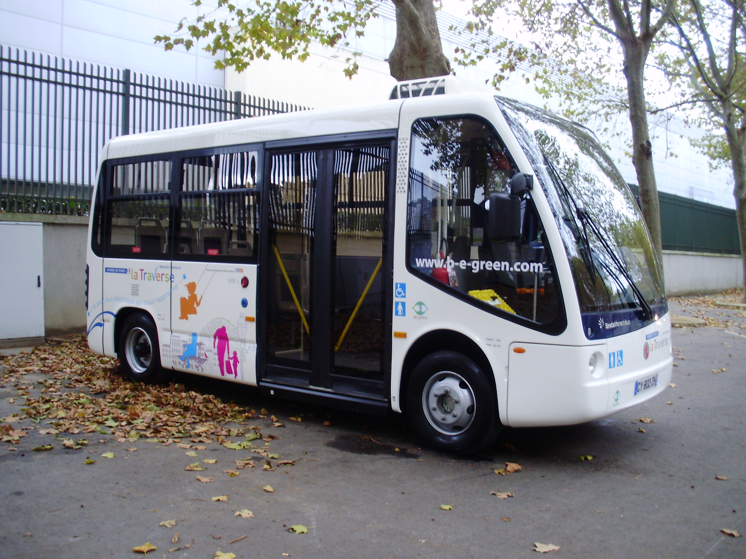 Bus électrique de marque italienne BredaMenaribus, de type ZEUS (Zero Emission Urban System), utilisé sur la ligne « Traverse Brancion-Commerce » à Paris 15e, en stationnement rue de la Porte-d'Issy à côté du service commercial de la ligne.